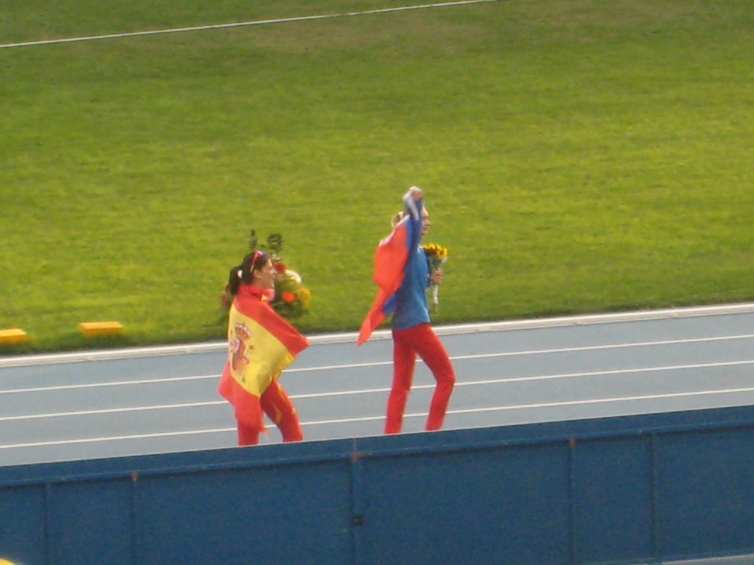 Чемпионат мира по лёгкой атлетике 2013. Чемпионка мира Светлана Школина (Россия) и бронзовый призёр Рут Бейтиа (Испания) проходят круг почёта после завершения соревнований в прыжке в высоту.